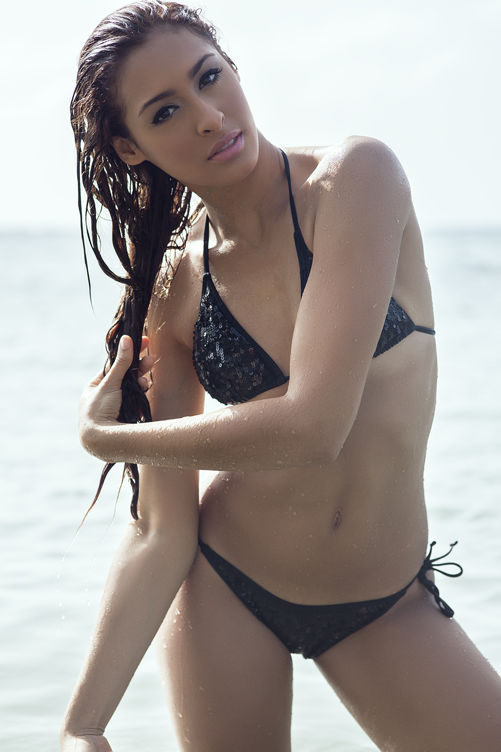 Larissa Dones -Miss San Juan PR